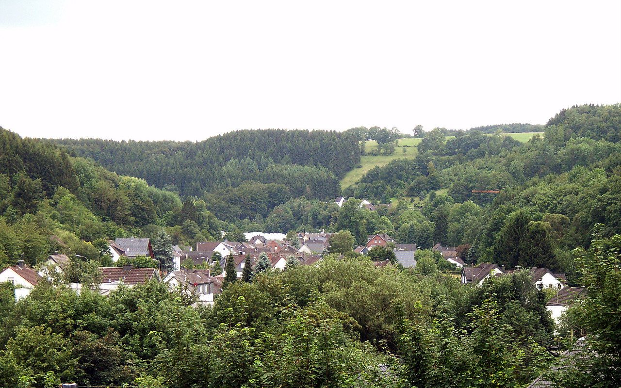 Dümmlinghausen, district of Gummersbach, North Rhine-Westphalia, Germany